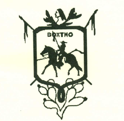 Escudo del municipio de Nopala de Villagrán, estado de Hidalgo.